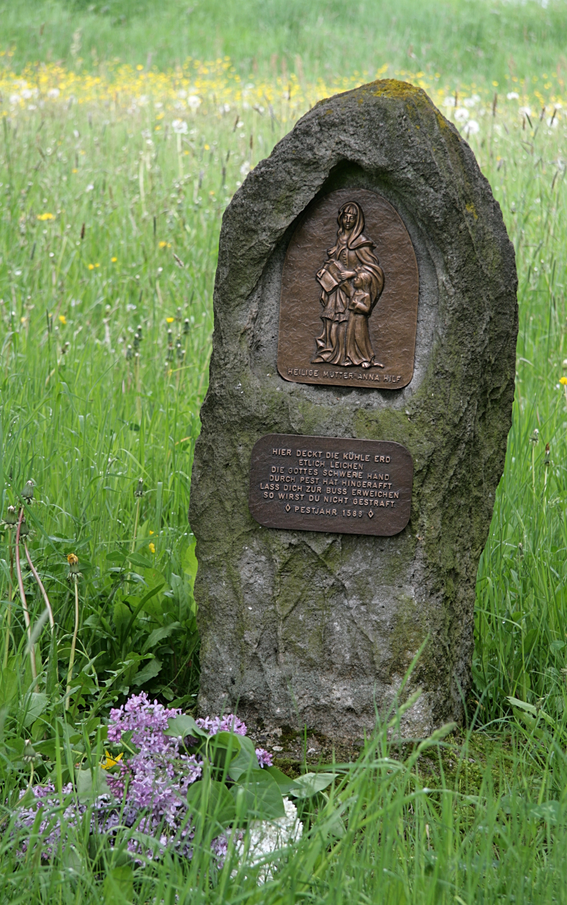 Pestmarterl von 1586, renoviert 1998, am Ortseingang von Hirschau-Ehenfeld